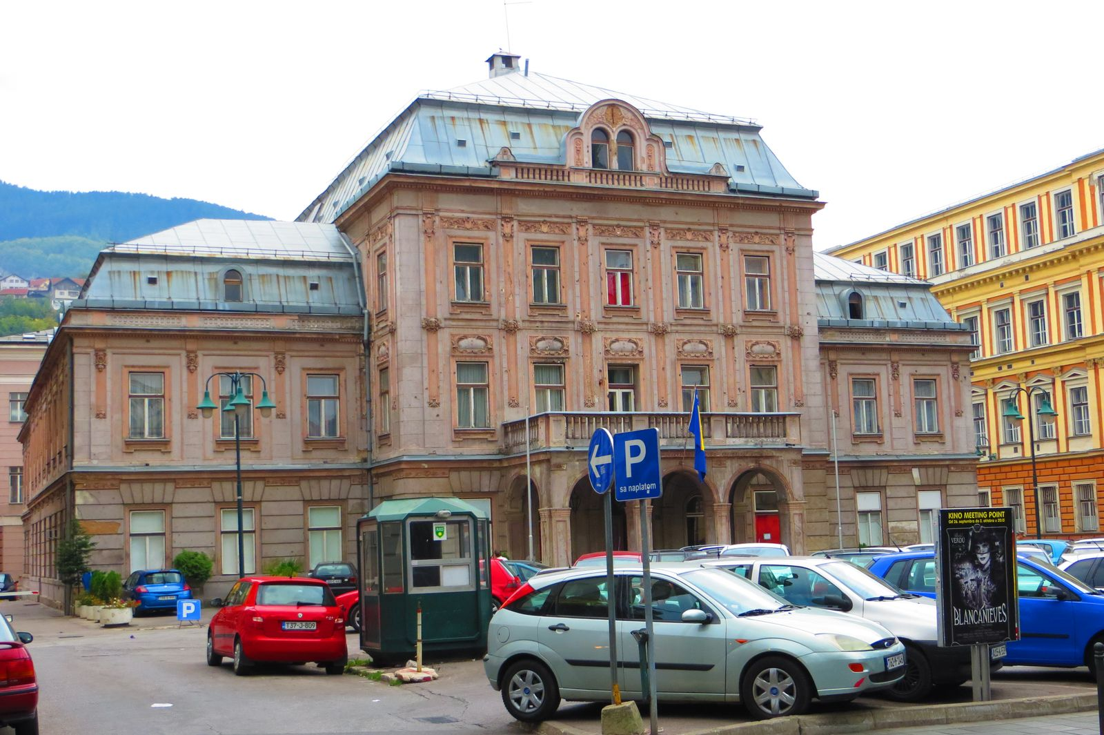 Dom Armije